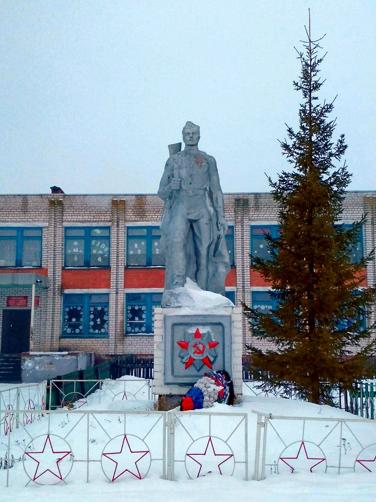 Чувашская Республика, Цивильский район, пос. Конар, ул. Школьная. Памятник погибшим в Великой Отечественной войне 1941-1945 гг.